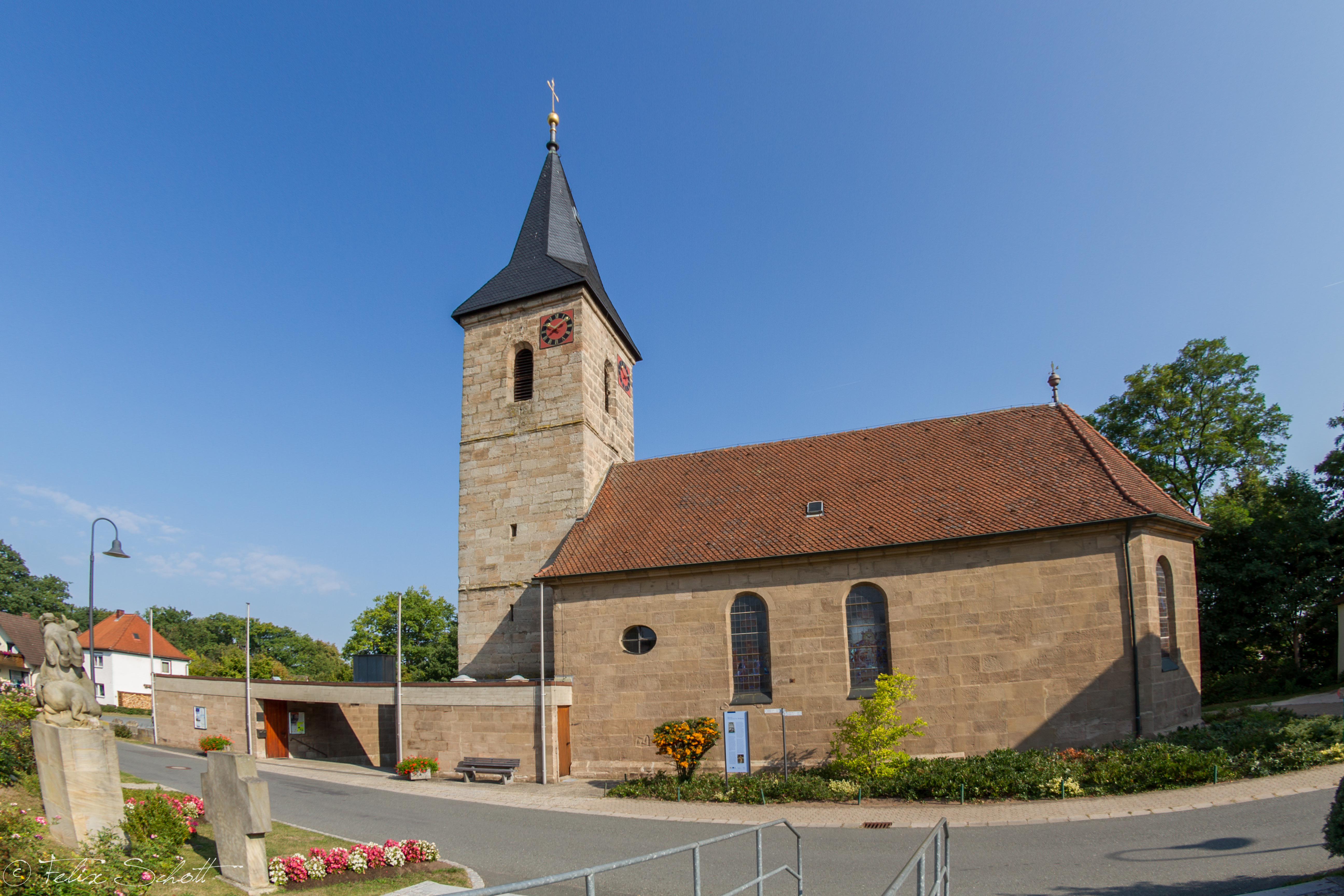 Katholische Pfarrkirche St. Wolfgang, Saalkirche mit dreiseitig geschlossenem und mit den Langhauswänden fluchtendem Chor, Sandsteinquaderbau mit Satteldach, Westturm mit Spitzhelm, spätgotische Anlage von 1468, Ausbau 1726-29, Turmhelm 1865-66; mit Ausstattung.This is a photograph of an architectural monument.